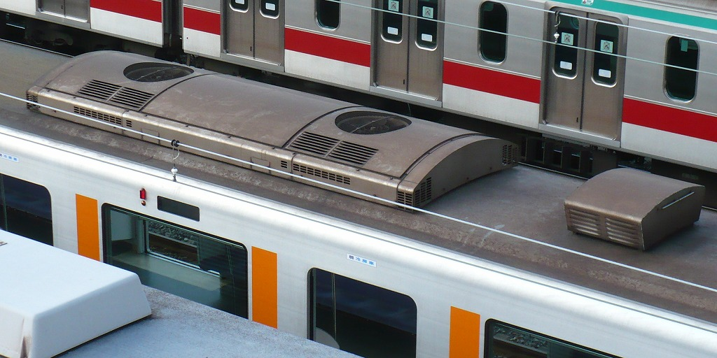 東武50050系の冷房装置